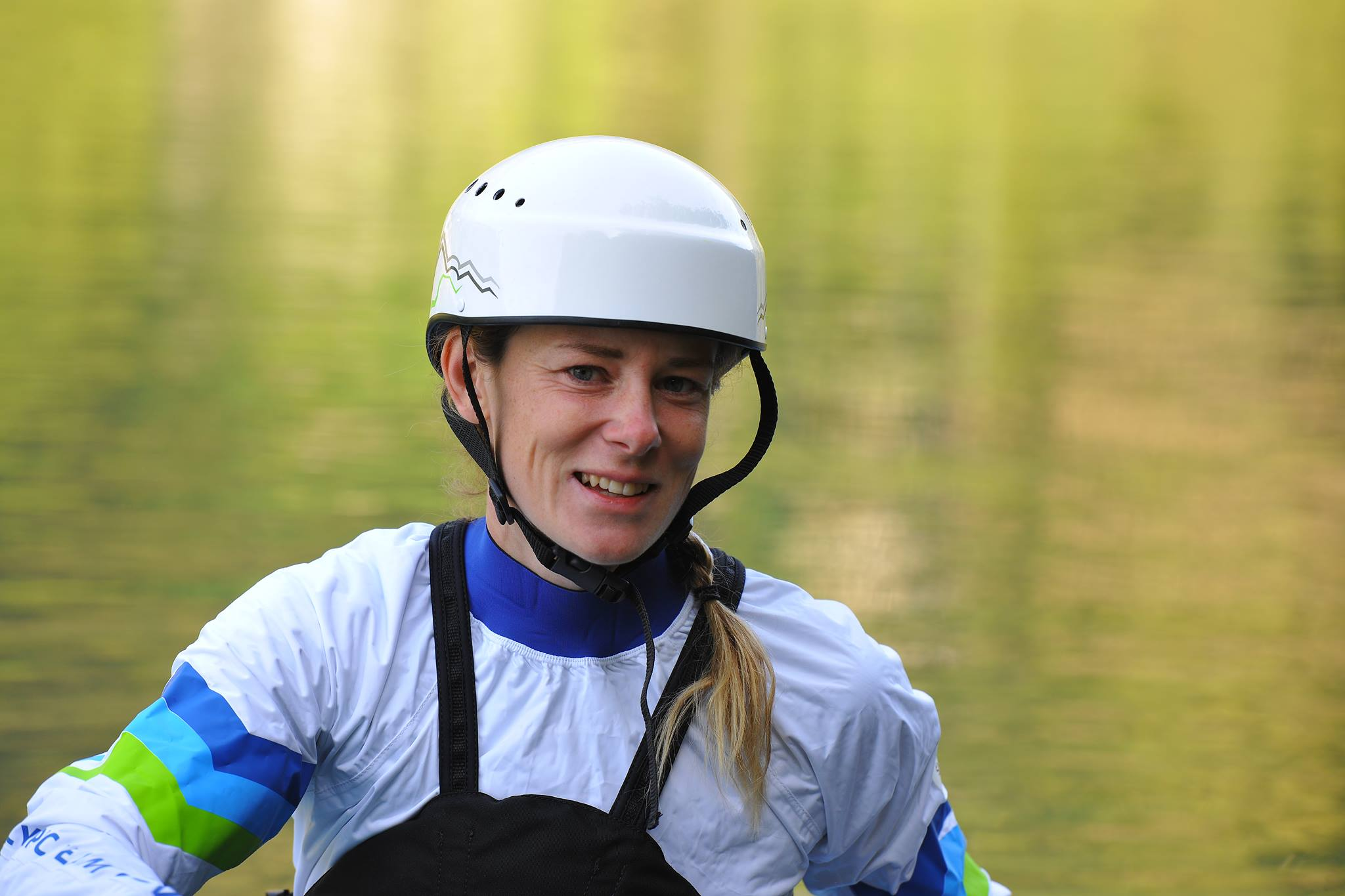 Soča 2016